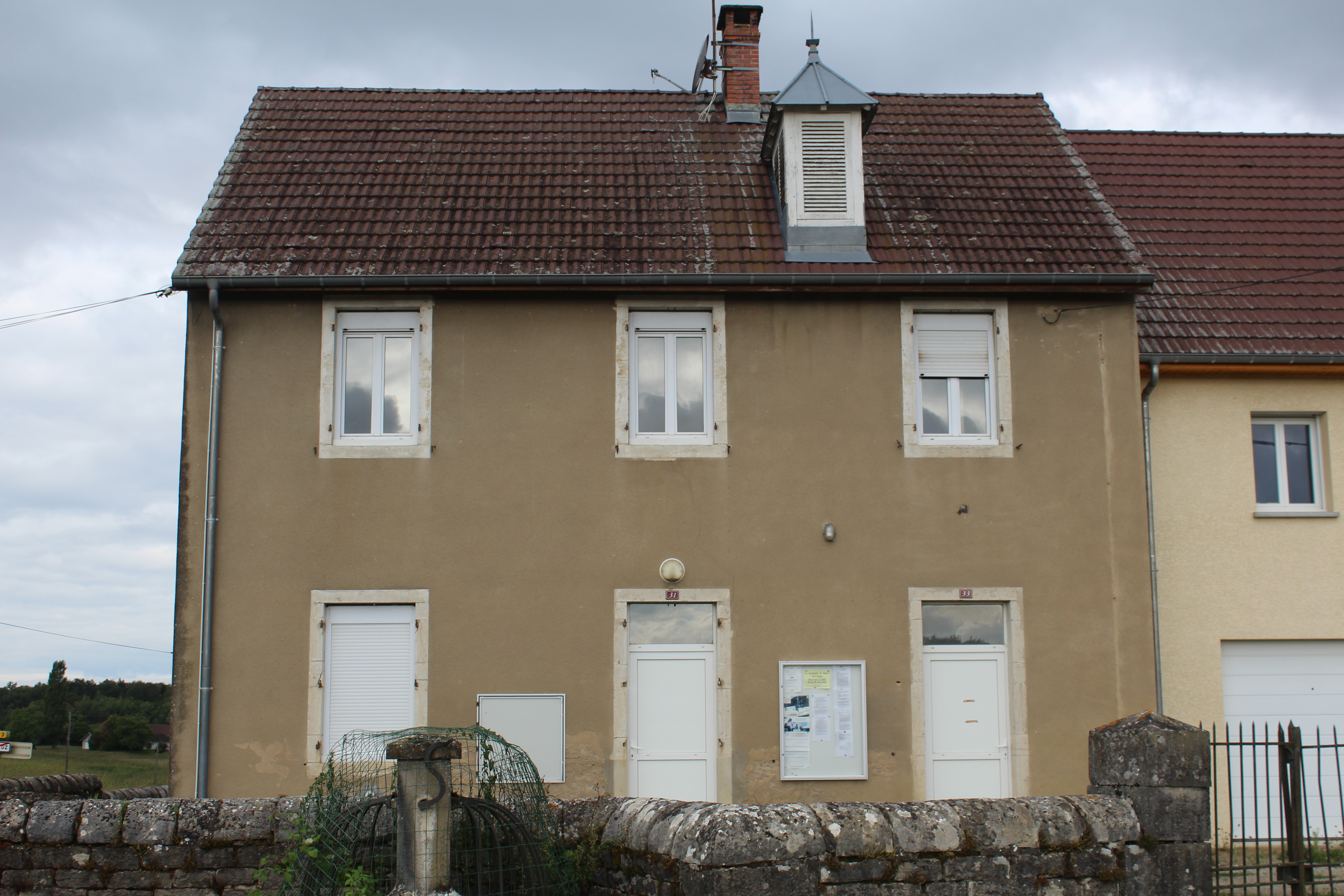 Mairie de Recanoz.